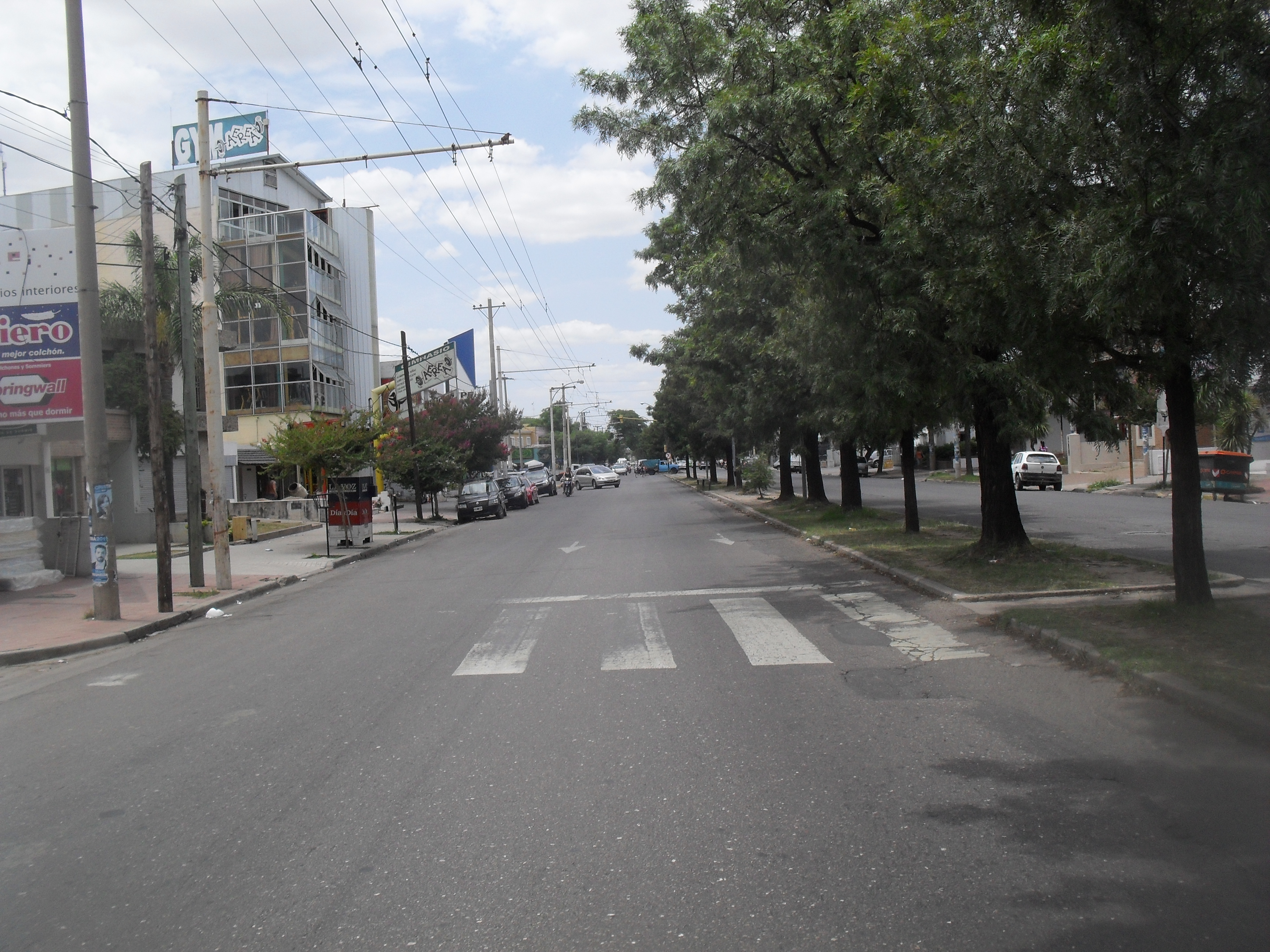 Vista de la avenida hacia el este.